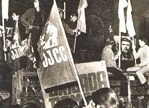 Partidarios de la Unidad Popular, coalición electoral de partidos políticos de izquierda y partidos socialistas de Chile que llevó a la Presidencia de la República a Salvador Allende.